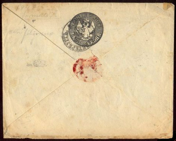 Штемпельный конверт. Санкт-Петербург.